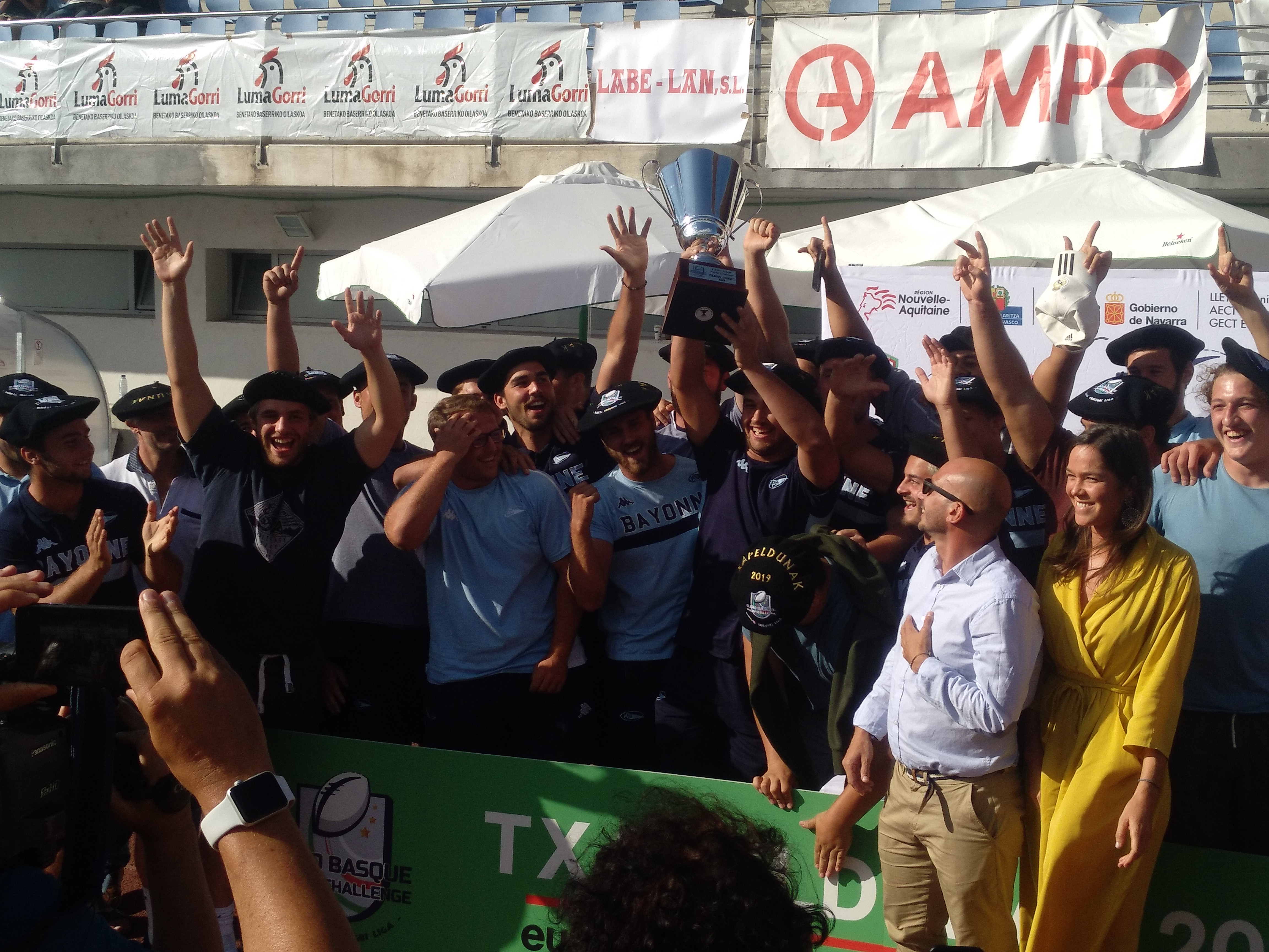 Euskal Errugbi Liga 2019. Aviron Bayonnaise izan zen txapelduna.